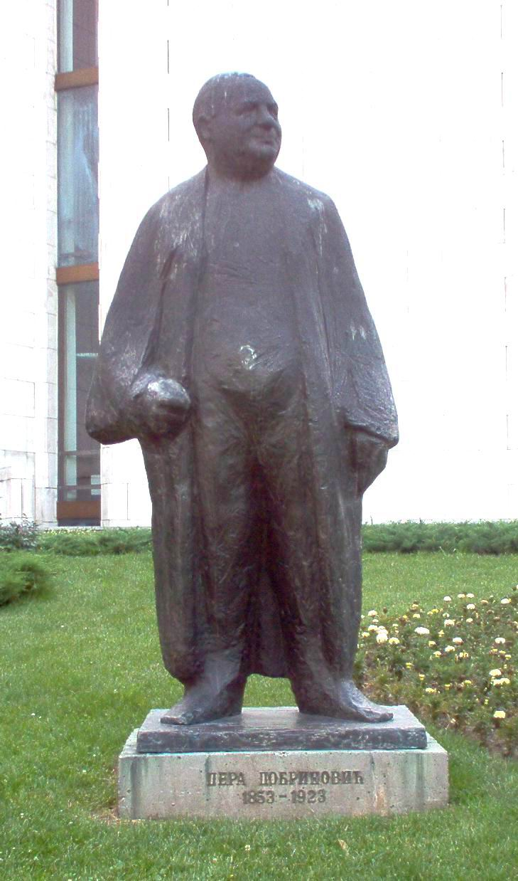 Пера Добриновић, глумац, споменик испред Српског народног позоришта у Новом Саду. Фотографисао Голдфингер. Licensing Fotografisao Goldfinger. U javnoj upotrebi!